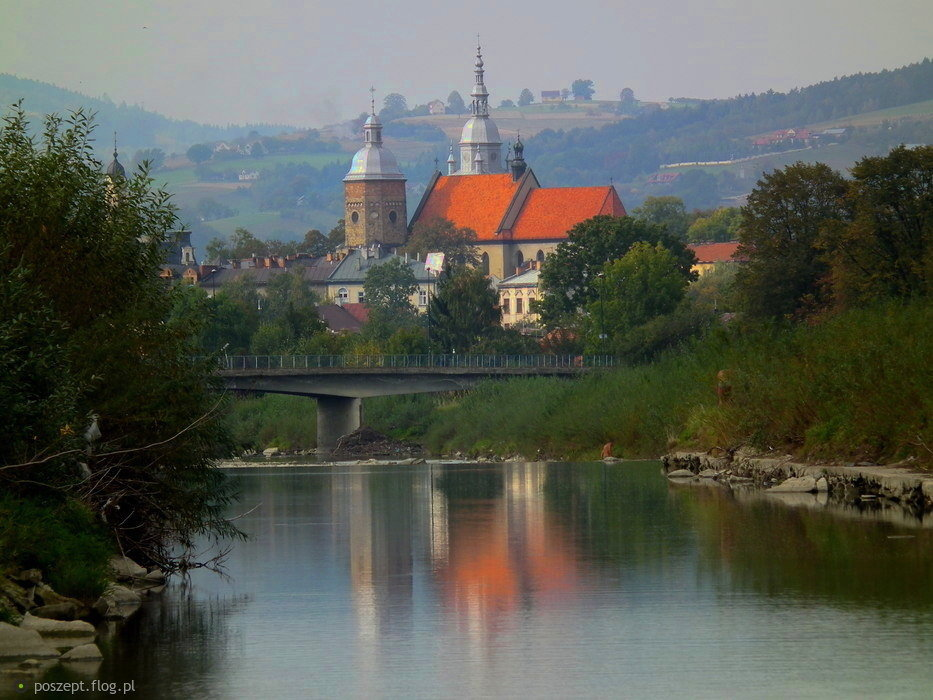 Nowy Sącz, kościół par. p.w. św. Małgorzaty, XIV, XIX